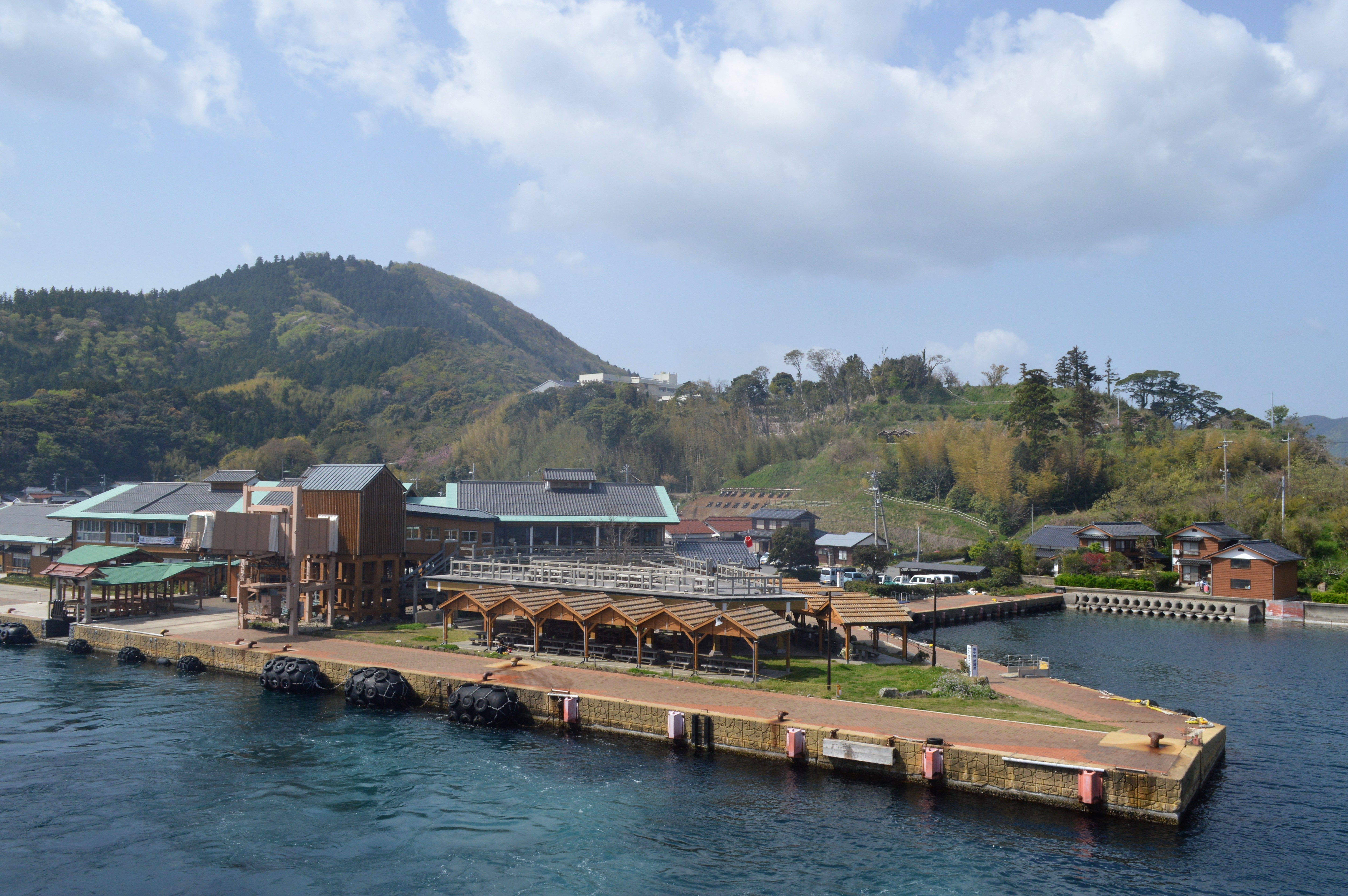 島根県隠岐郡海士町の菱浦港。左はキンニャモニャセンター。中央の丘の上には島根県立隠岐島前高等学校。